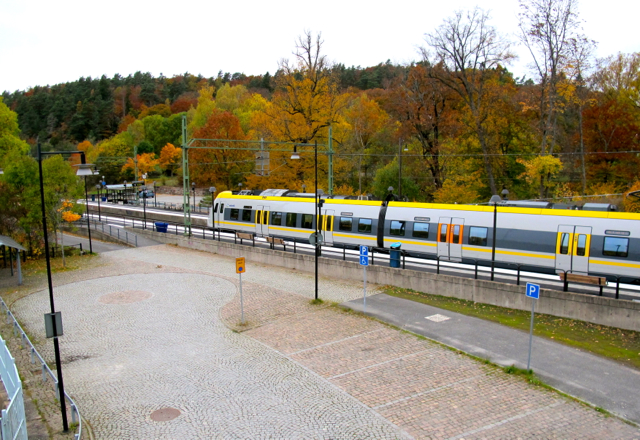 Jonsereds station oktober 2013: Pendeltåg från Alingsås ankommer